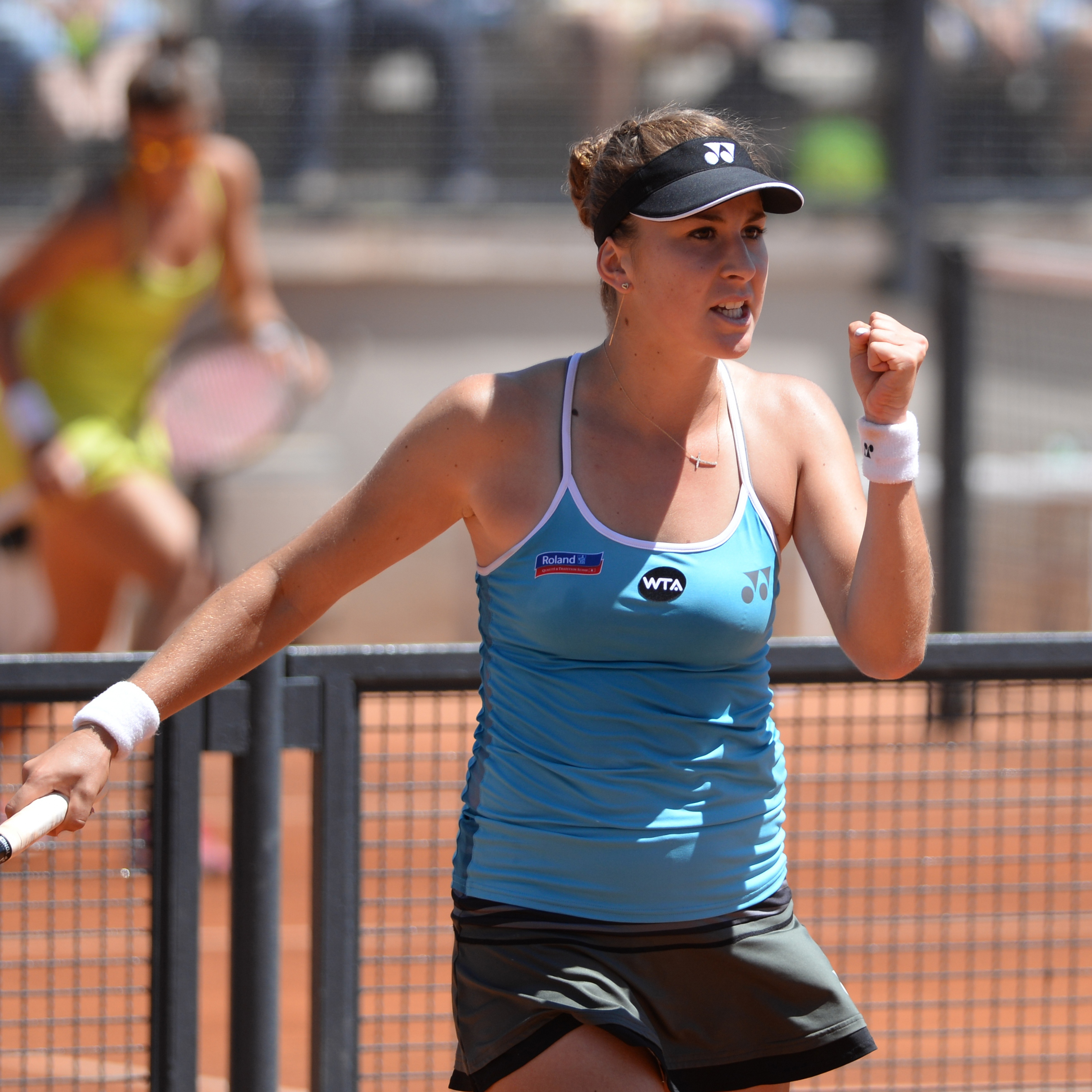 Belinda Bencic